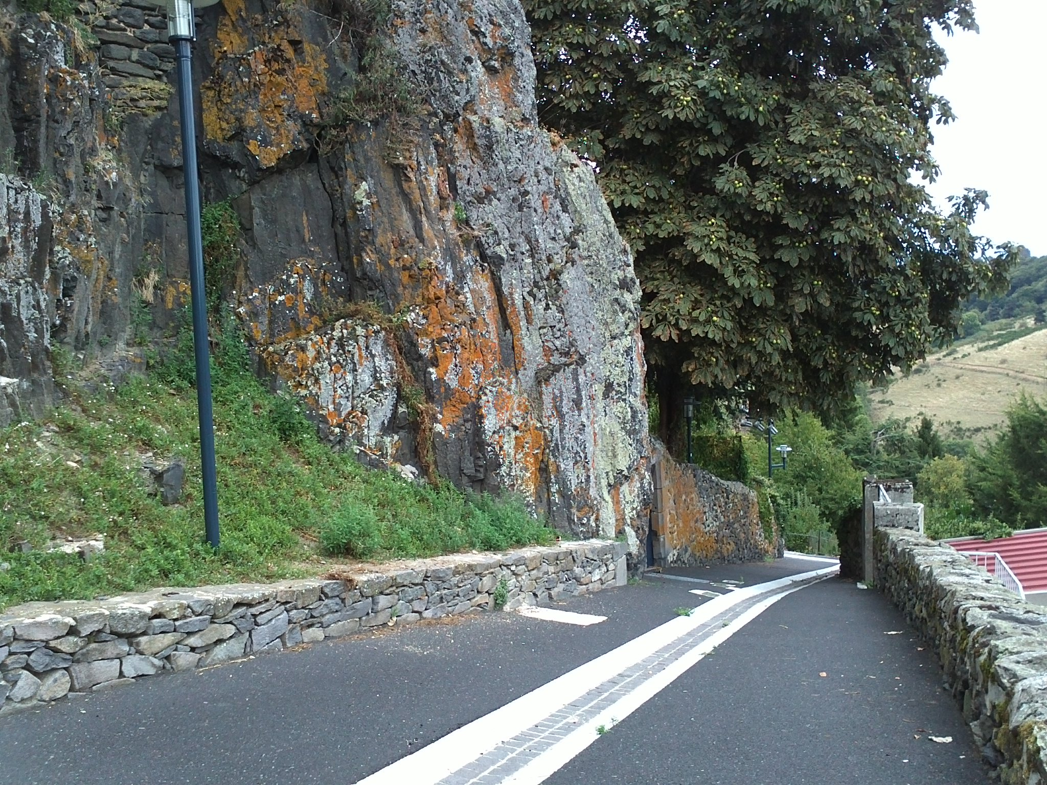 Une forte pente à Saint-Flour